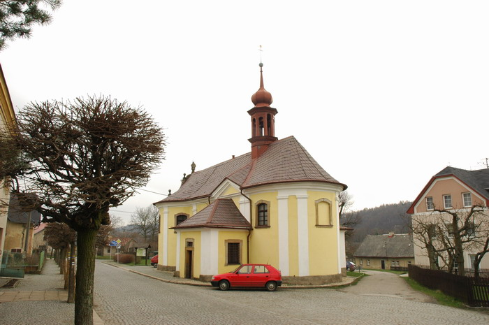 Kostel sv. Jana Nepomuckého - Studnice (NA)